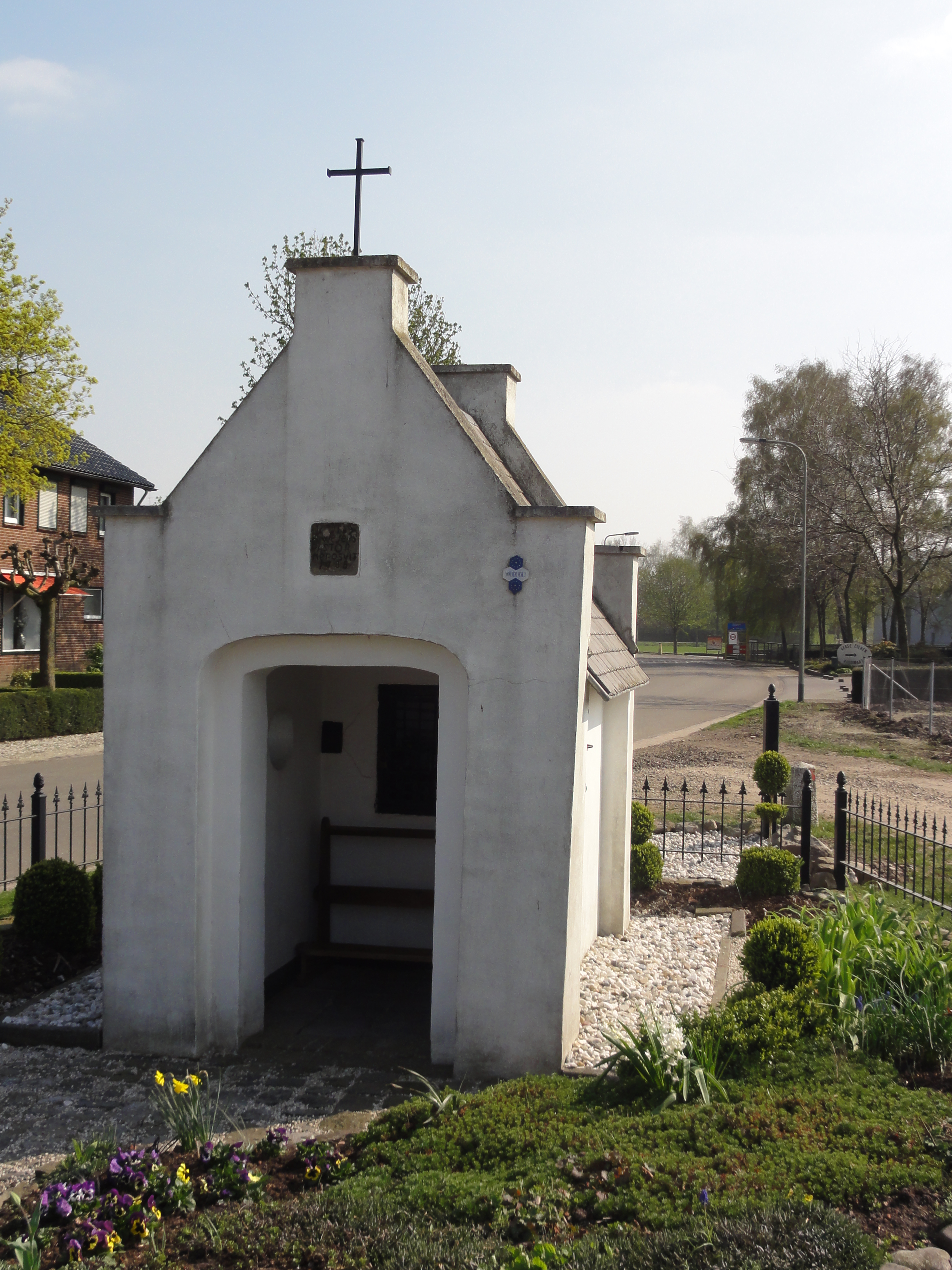 Venray Oirlo, Annakapel, wegkapel uit 1788.